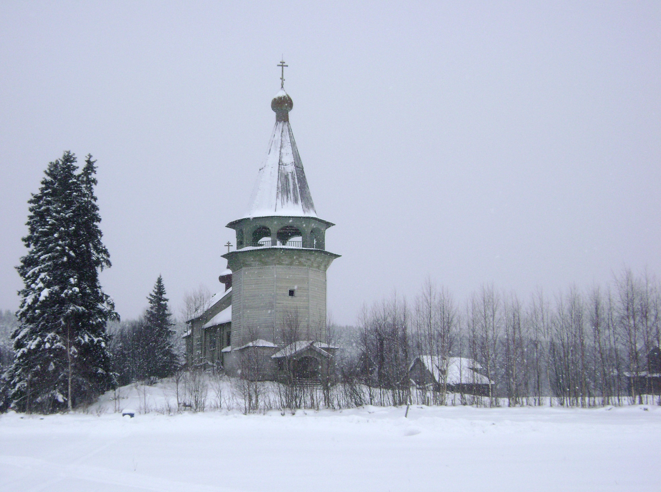 Церковь Николая Чудотворца.